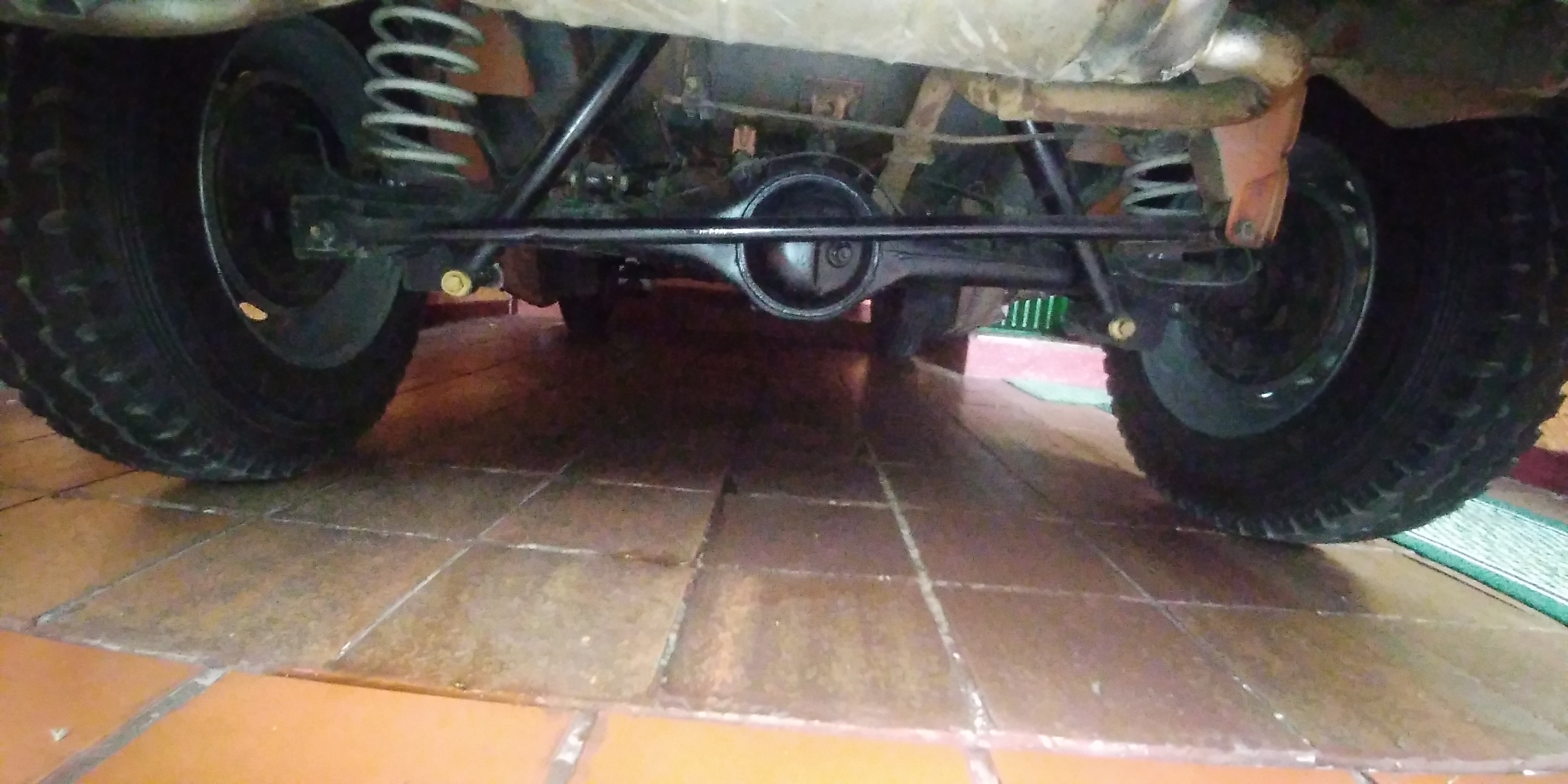 puente trasero